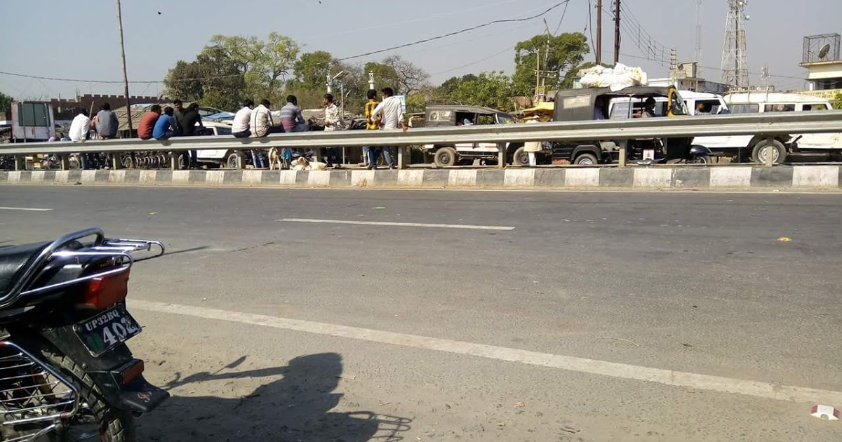 फखरपुर का फोटो है इस फोटो को फुरकान एस खान ने साल 2016 में मोबाइल से ली थी (के.जी.एन) मोबाइल शॉप के सामने से इस फोटो को फुरकान एस खान अपने फेसबुक और ब्लॉगर पर डाल चुके हैं